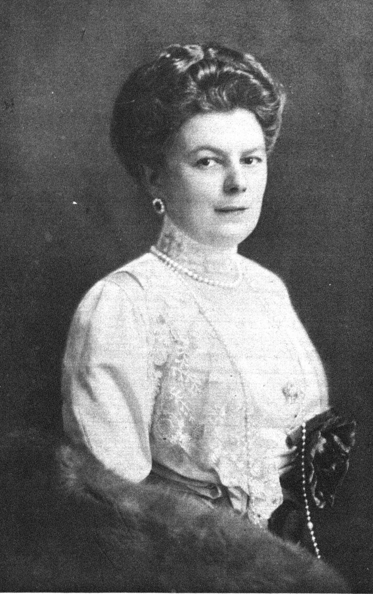 Duquesa Sofia de Hohenberg.